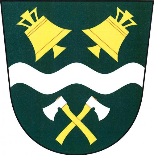 Ostrovec znak